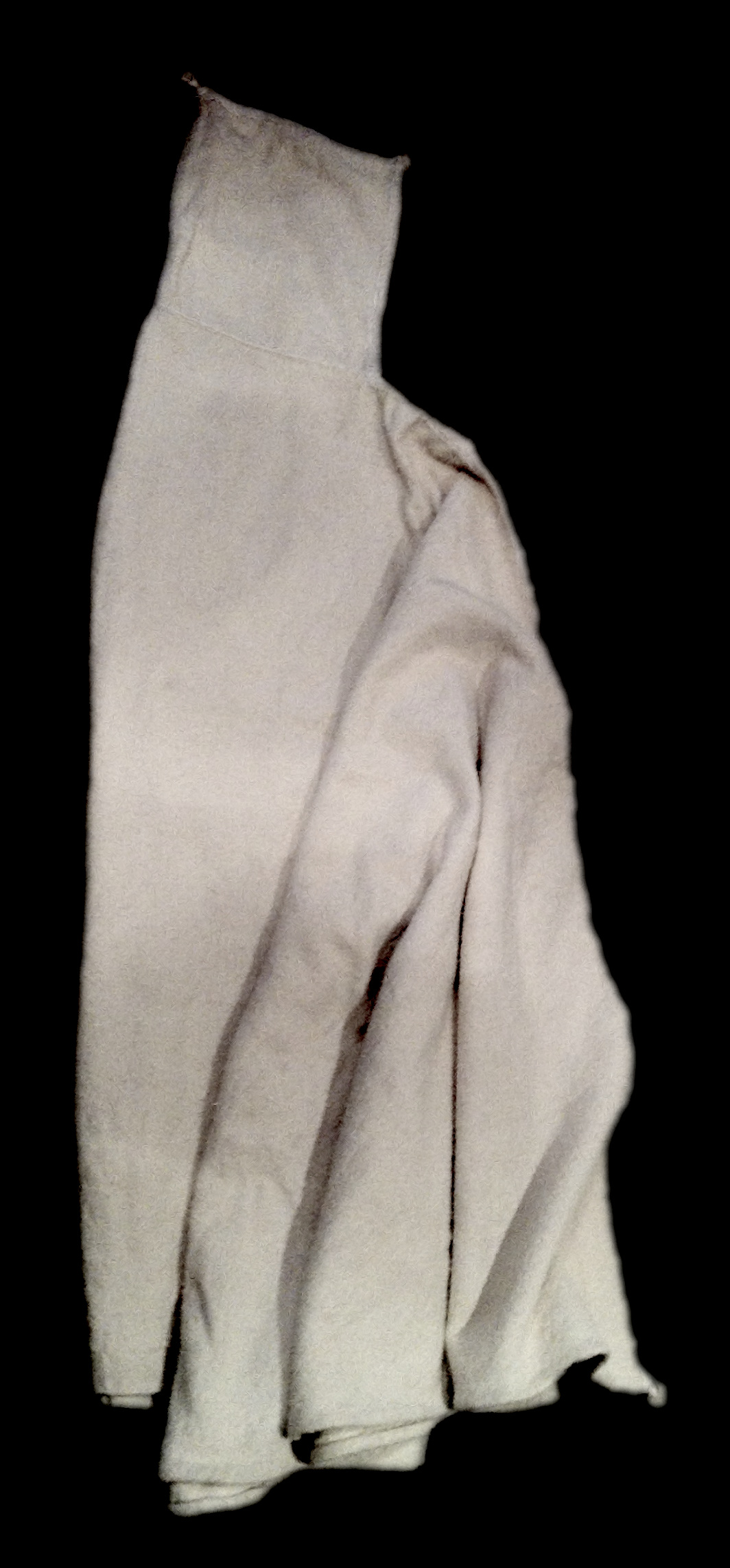 Image d'un burnous de Tunisie (ville de Sayada) de couleur blanche sur un fond noir This photograph was taken with an iPhone 4 This JPG graphic was created with GIMP.